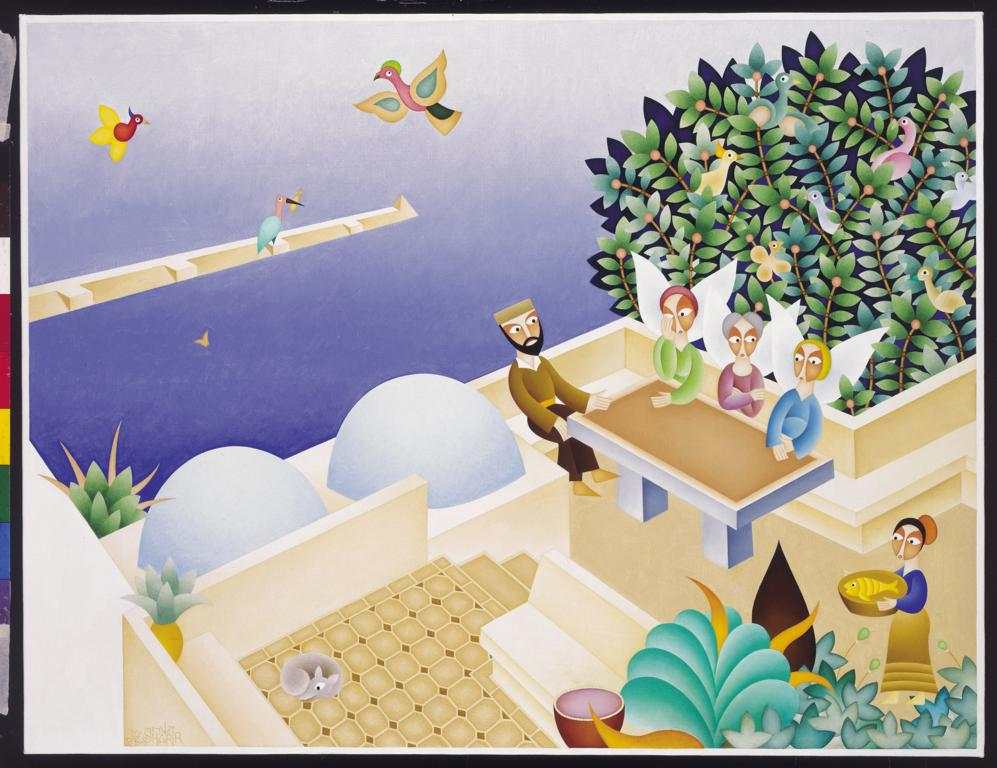 המרפסת ביפו